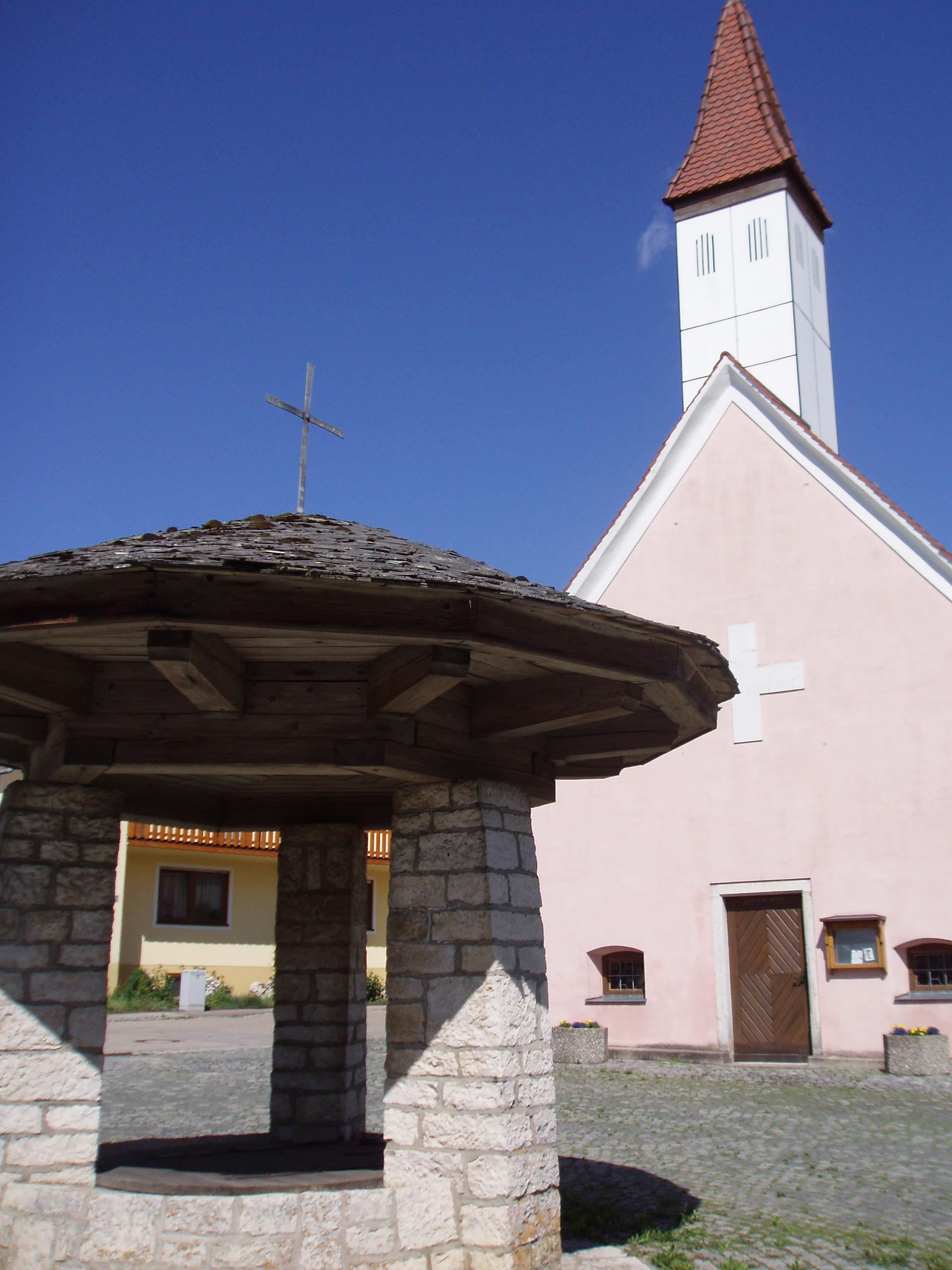 Eberswang im Landkreis Eichstätt, Solakapelle und Solabrunnen